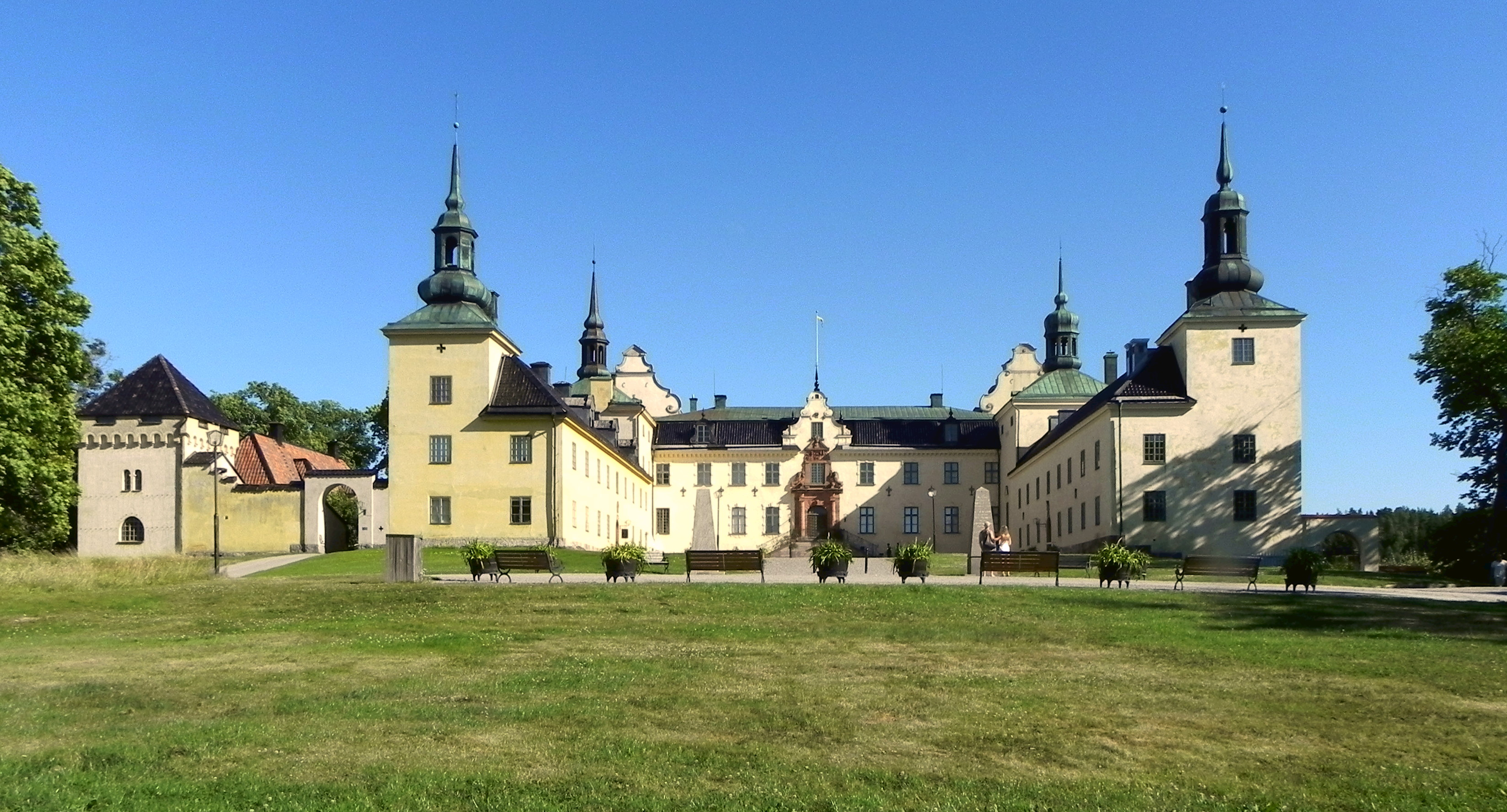 Tyresö slott fasad mot landsidan